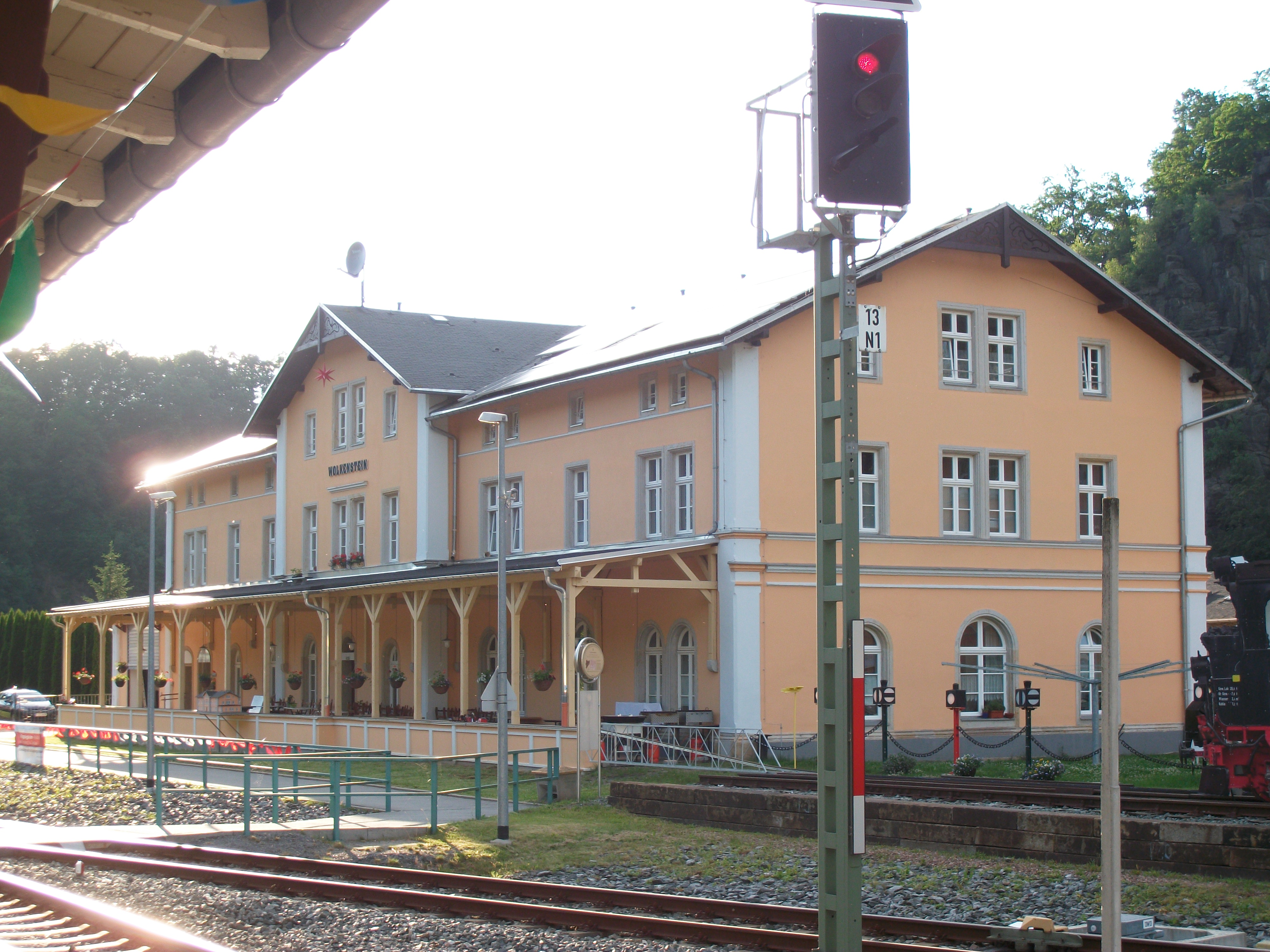 Bahnhof Wolkenstein, Empfangsgebäude (2016)